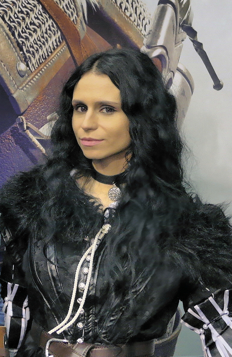 Ethlaine jako Cosplay Yennefer z Vengerbergu z sagi o Wiedźminie, Poznań Game Arena 2015